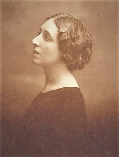 Medea Norsa